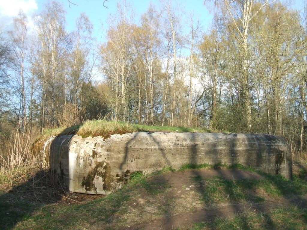 ДОТ в парке "Сестрорецкие Дубки" входил в систему бывшего КаУРа